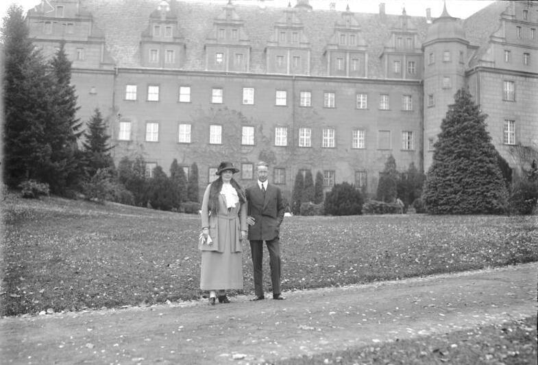 Die Rückkehr des Kronprinzen nach Deutschland. Der Kronprinz mit seiner Frau im Garten seines neuen Wohnsitzes im Schloss Oels in Schlesien.